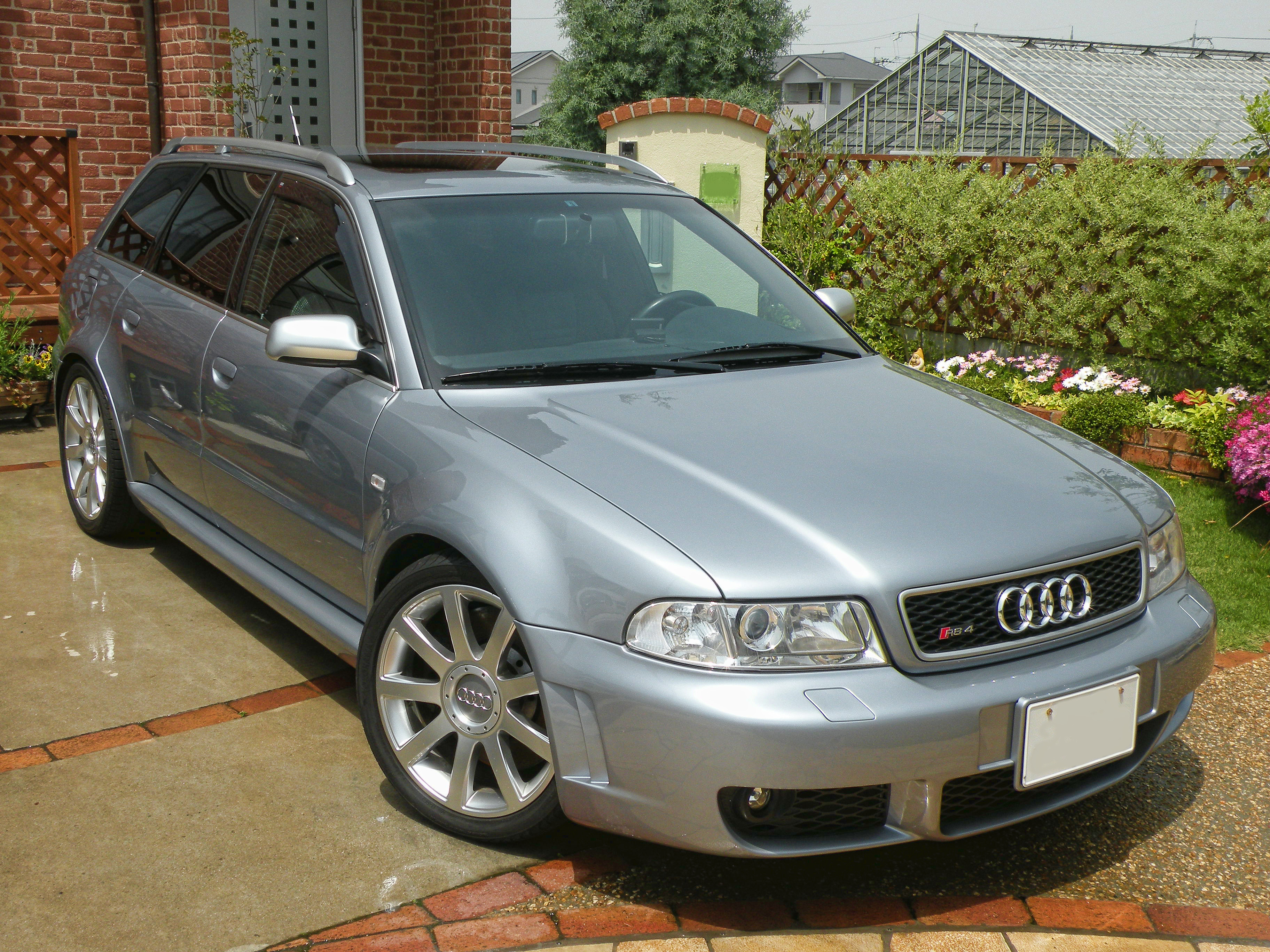 audi RS4 B5 modelyear 2000-2002